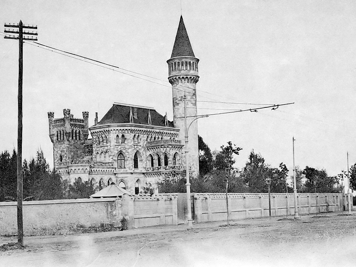 Palacio de Ripalda, Valencia, Spain.